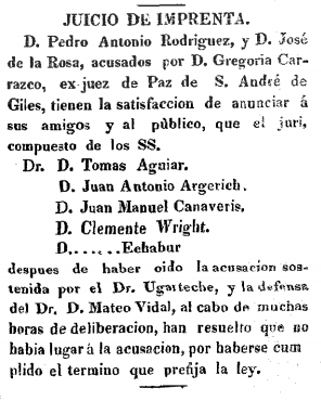 Publicación del El Lucero. Diario político, literario y mercantil del 20 de marzo de 1833. (Juan Manuel Canaveris)